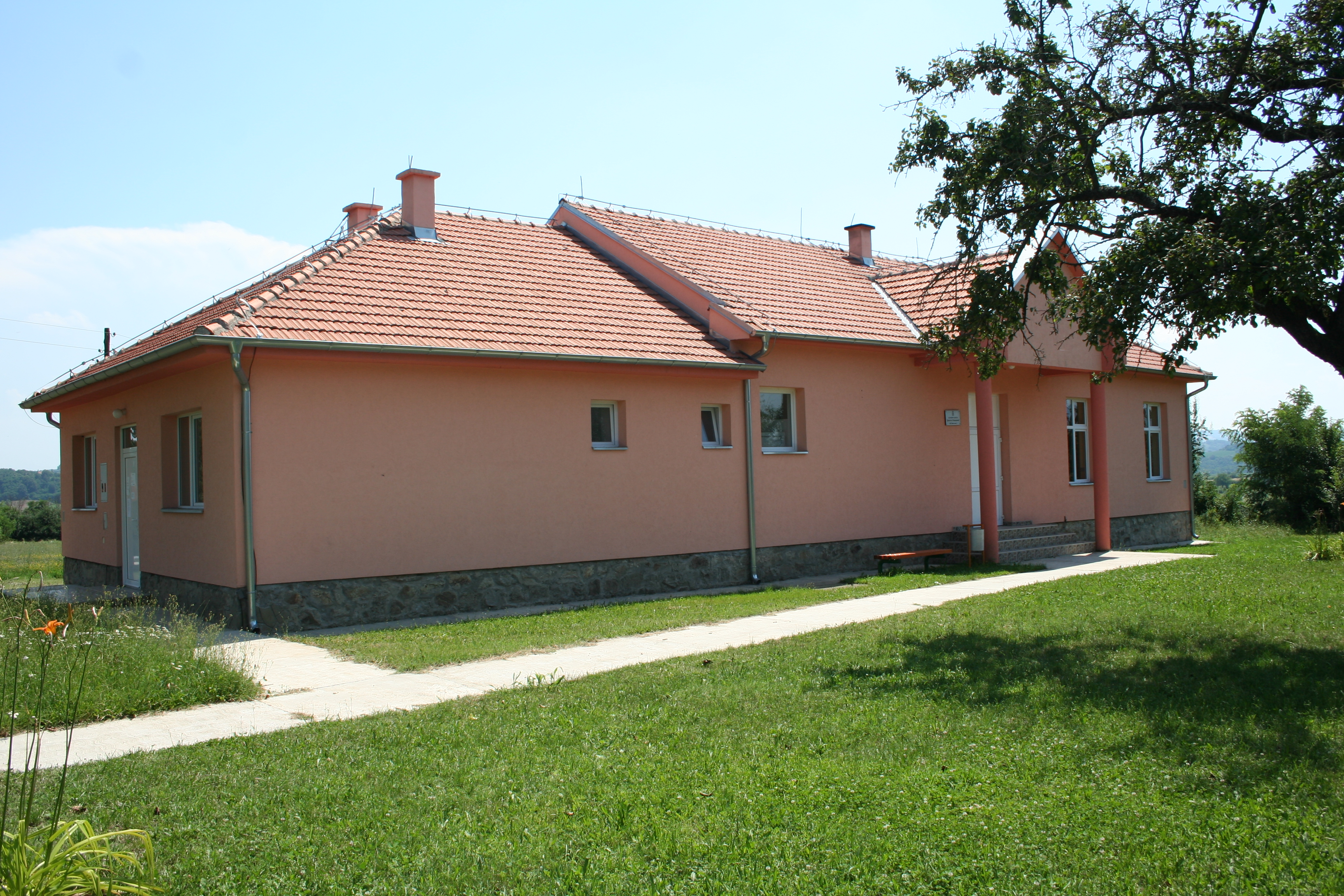 Zgrada škole u Metliću